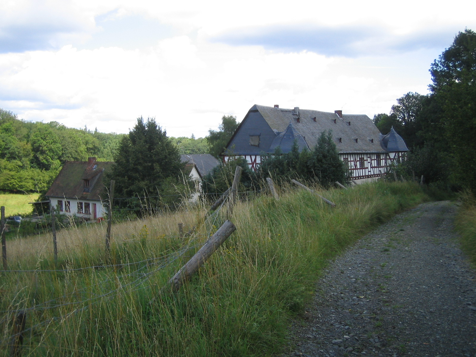 Eichelbacher Hof zwischen Hasselbach und Cratzenbach in der Gemarkung Rod an der Weil der Gemeinde Weilrod